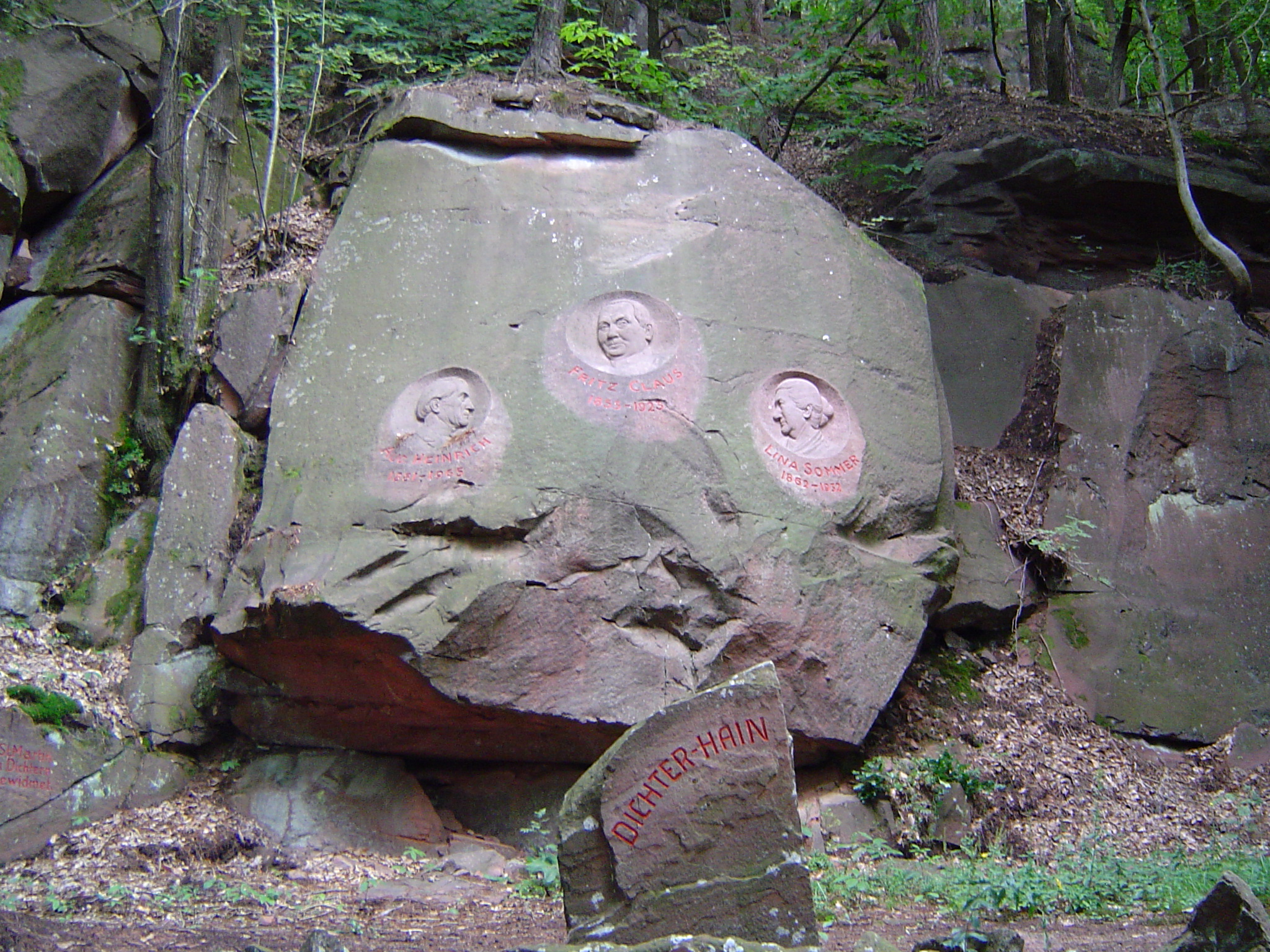 Dichterhain - Naturdenkmal in St. Martin (Pfalz) - Rheinland-Pfalz